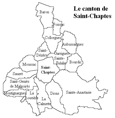 Le canton de Saint-Chaptes Image personnelle